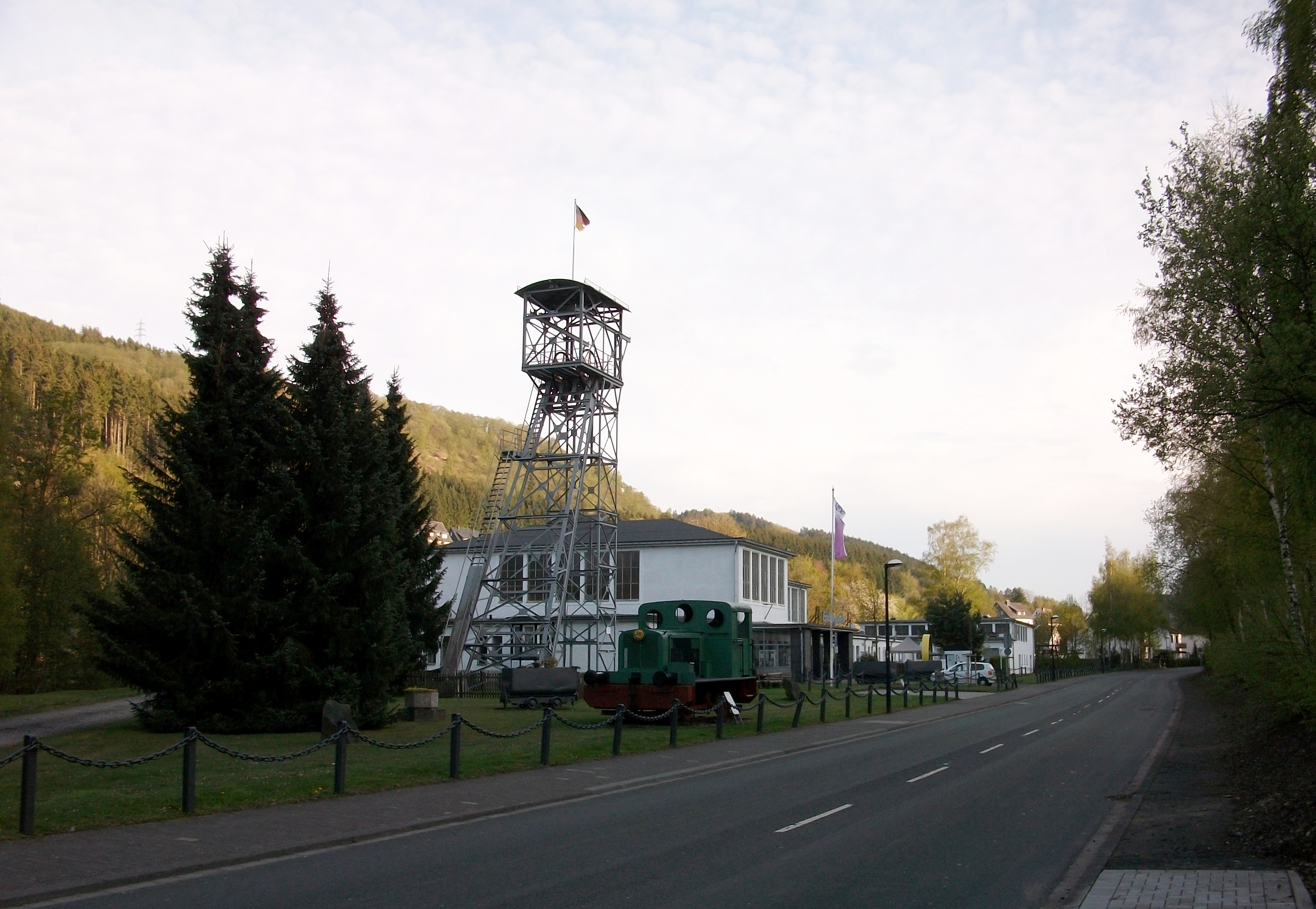 Bestwig-Ramsbeck, Bergbaumuseum (Germany)